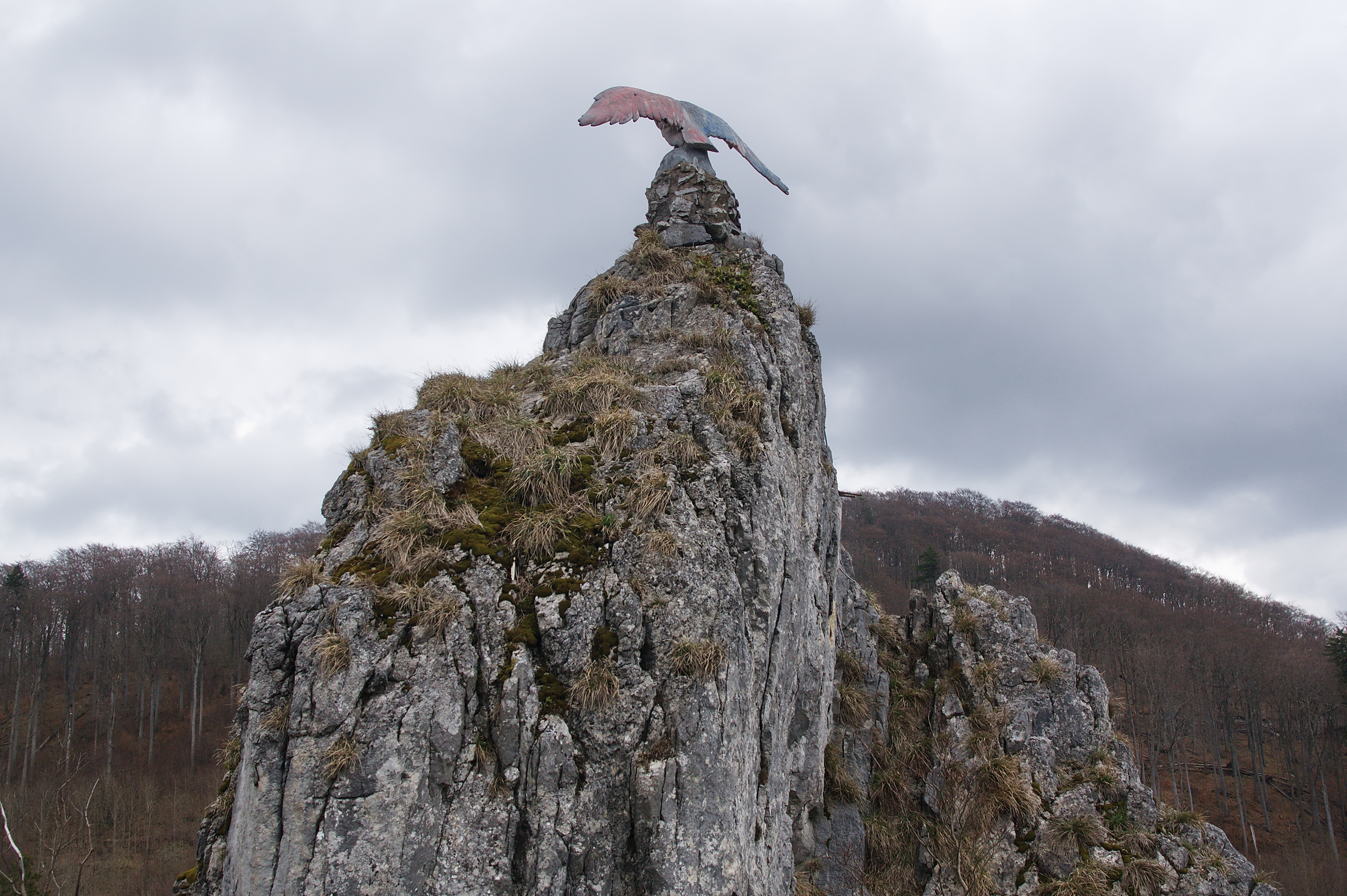 Hübichenstein bei Bad Grund (Harz) in Niedersachsen, Deutschland